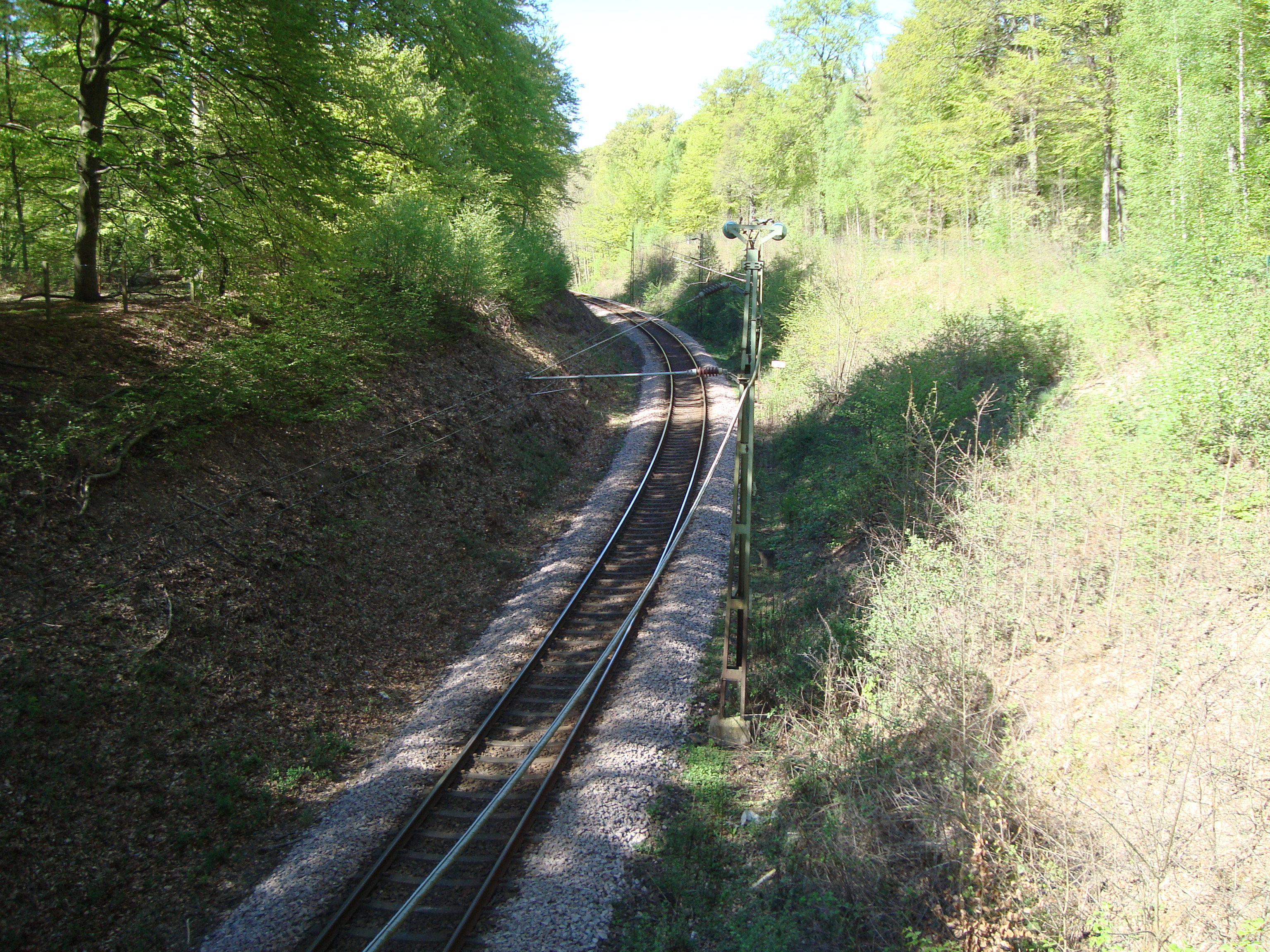 Västkustbanan som skär genom Pålsjö skogs södra del i Helsingborg.